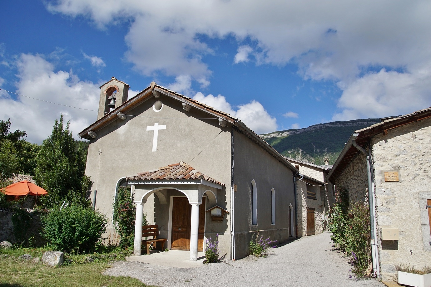 Département de la Drôme